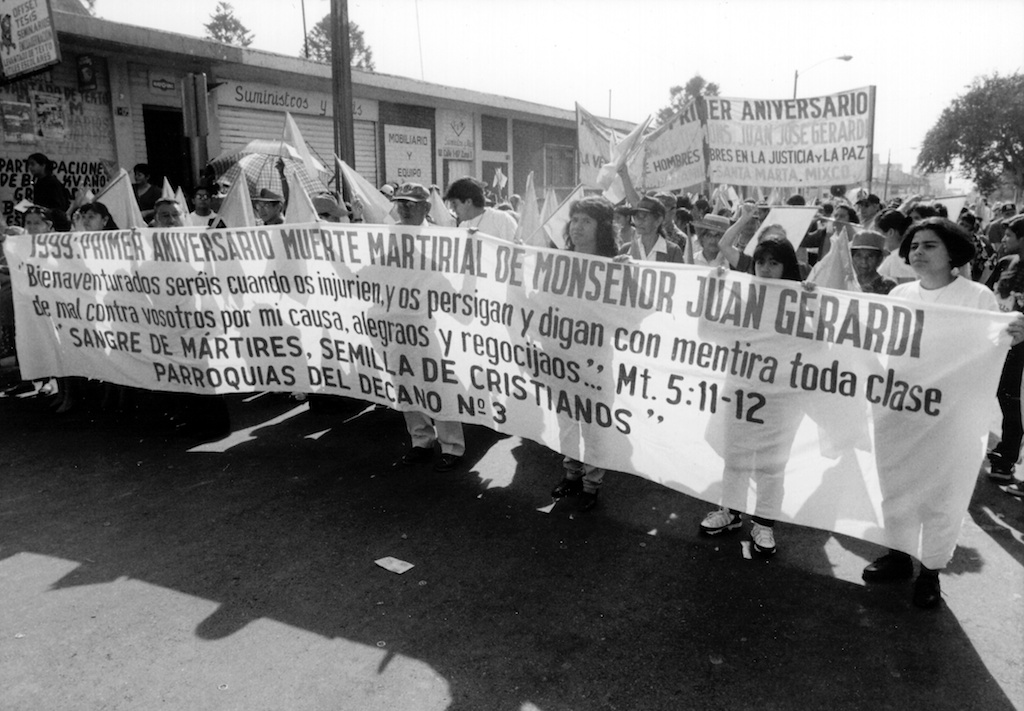 Città del Guatemala 1999 Primo anniversario uccisione Mons. Gerardi Foto © Michele Ferraris